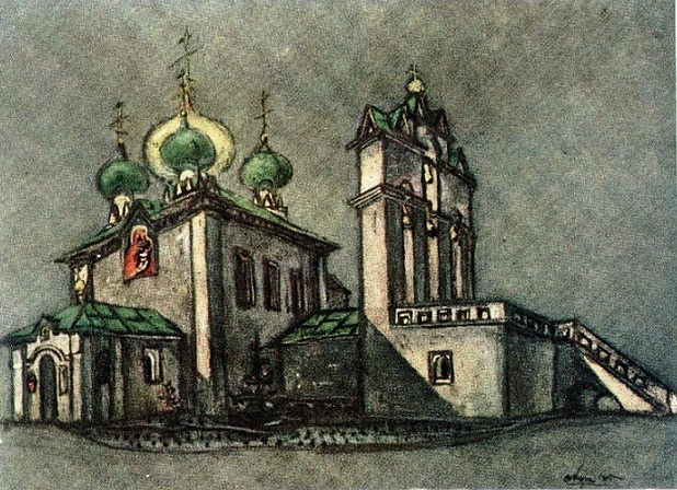 Эскиз храма Преображения Господня на московском Братском кладбище с серии открыток, выпущенных в 1916 году